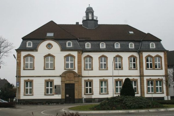 Denkmal Nr. 96 in Heinsberg